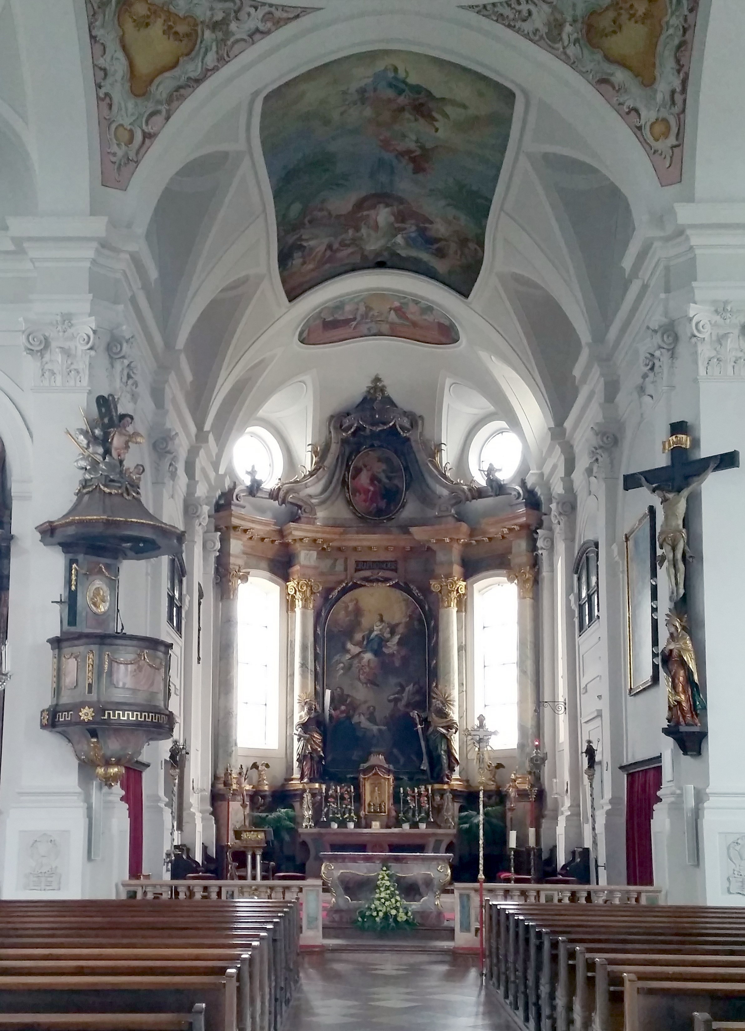 Kath. Pfarrkirche Mariä Himmelfahrt und Friedhof